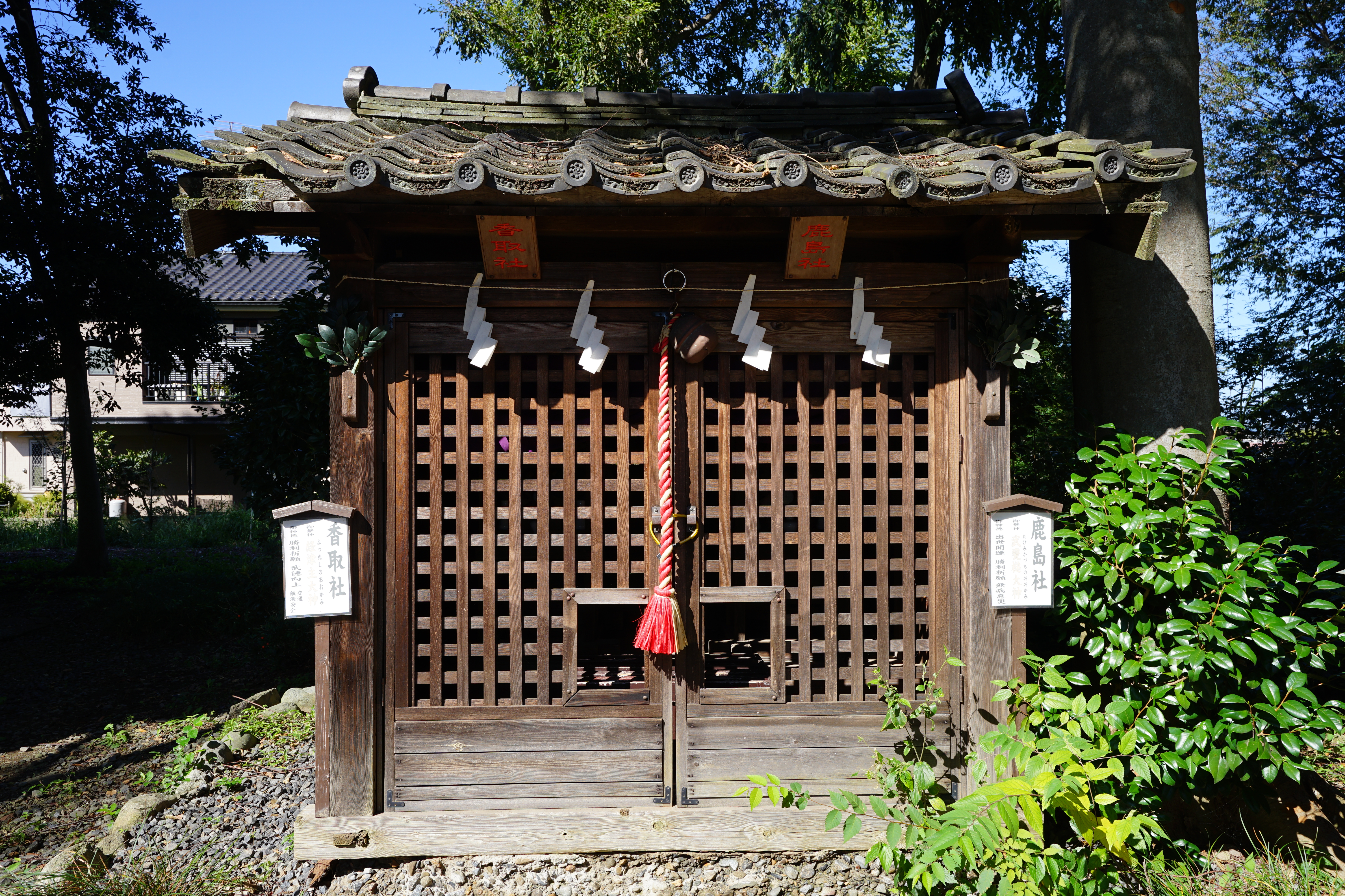 姫宮神社（埼玉県南埼玉群宮代町）境内社の鹿島社と香取社の合殿社